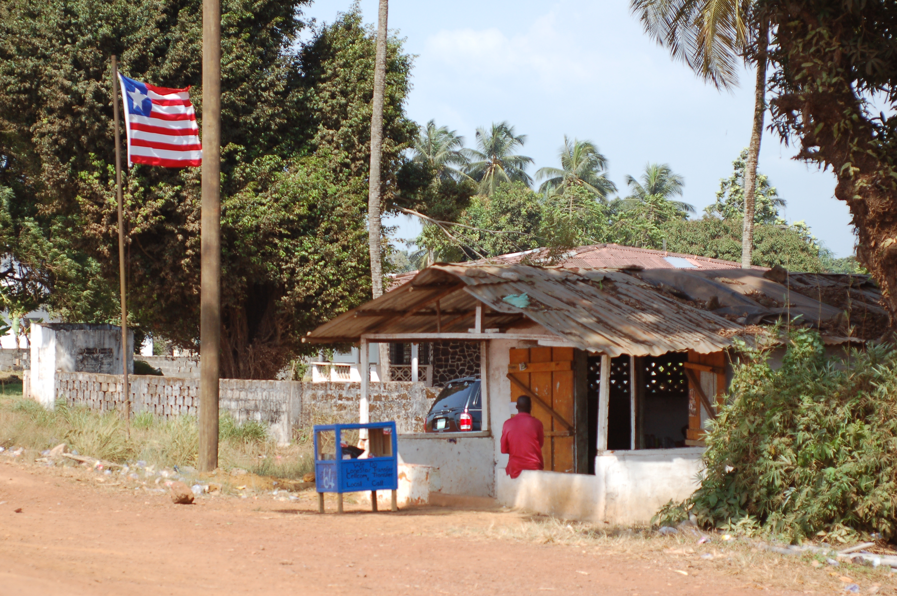 Liberian flag and duka